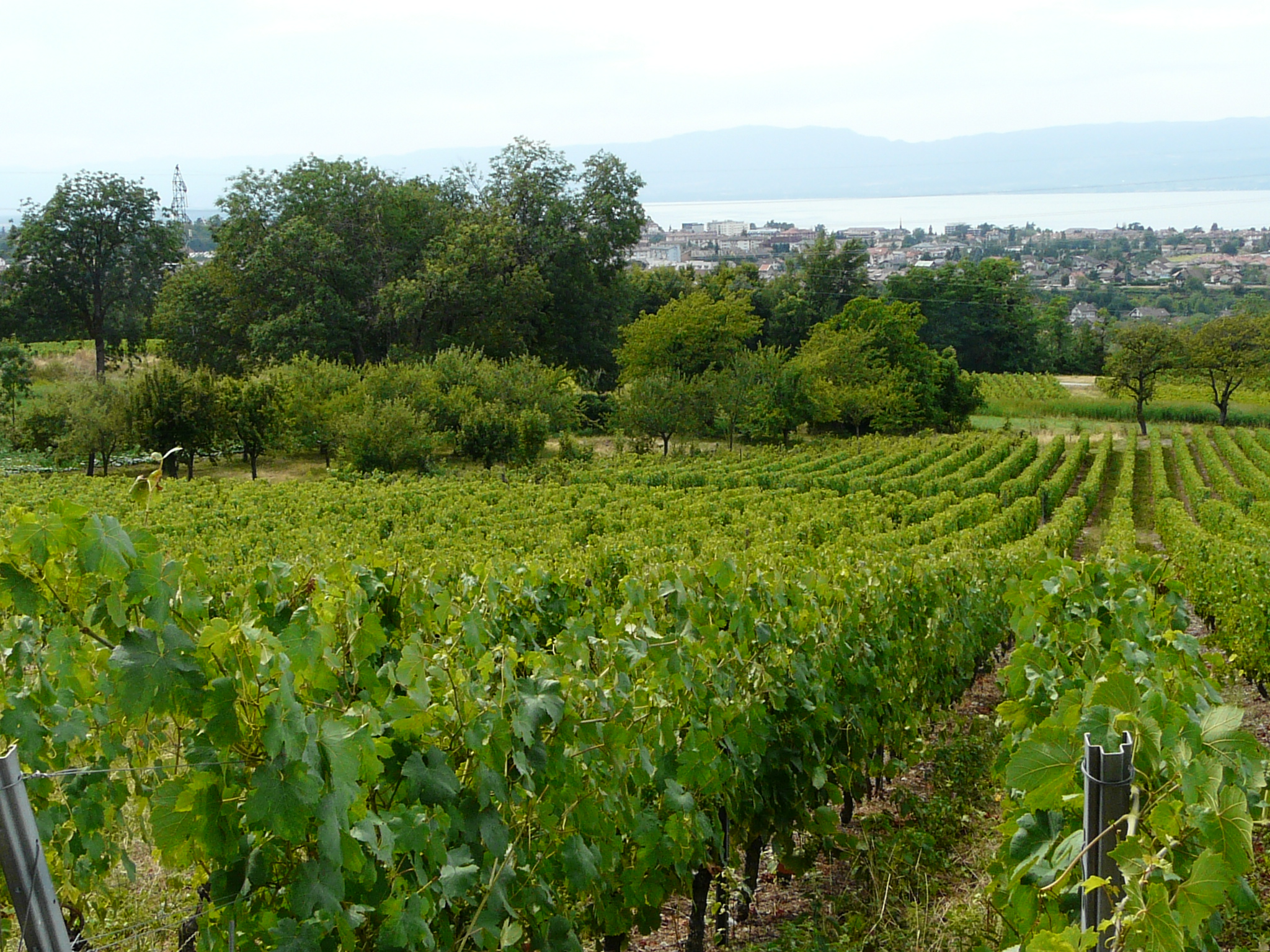 Le vignoble de Marin dominant le lac Léman